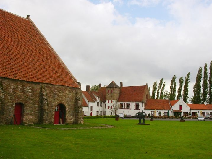 Ter Doest binnenplein - eigen foto